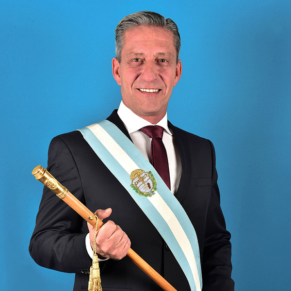 Mariano Arcioni, retrato oficial